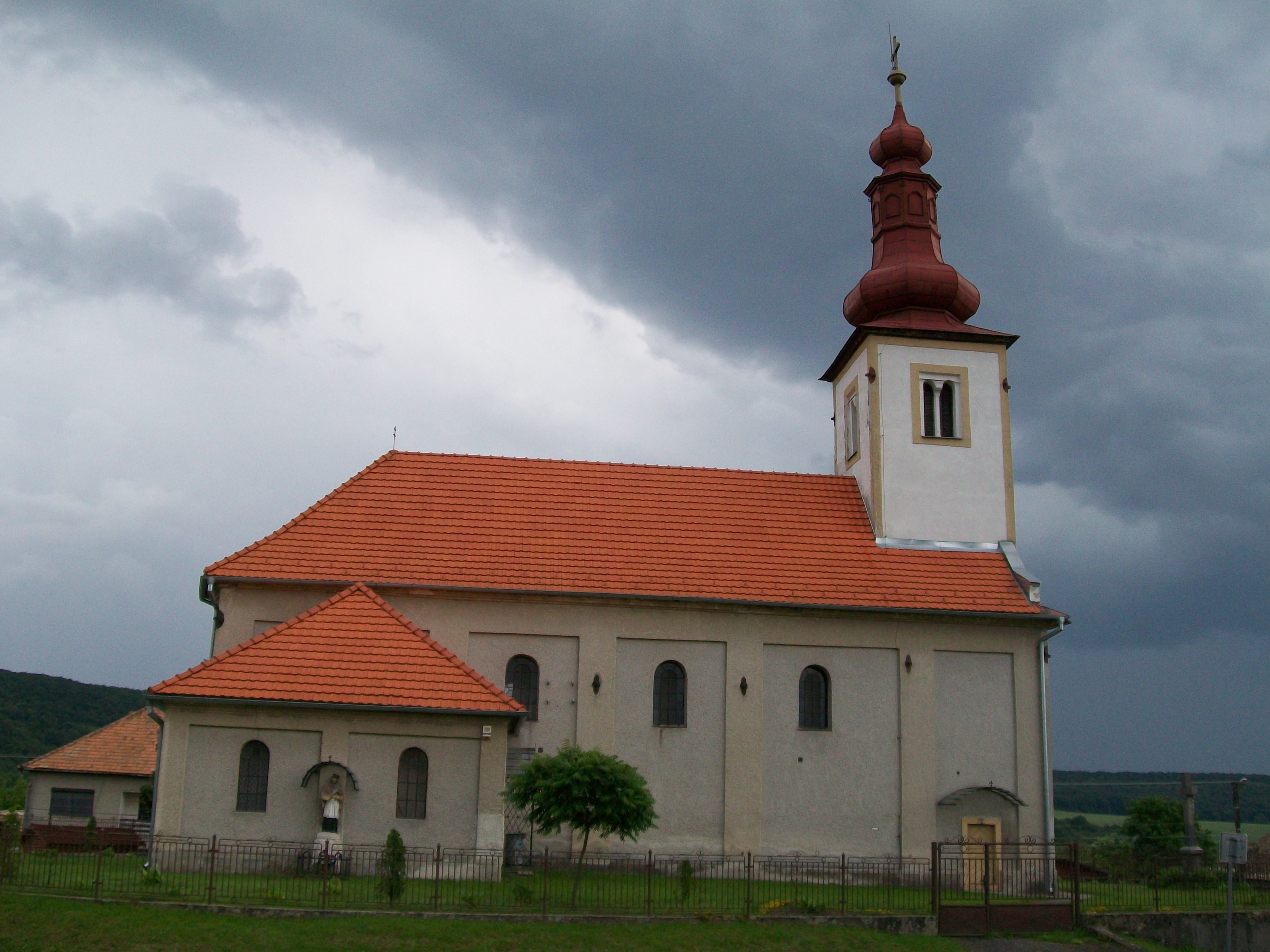 Rímskokatolícky kostol sv. Gallusa vo Veľkých Dravciach, postavený bol na začiatku 18. storočia, prestavaný a rozšírený v roku 1909 a opravovaný v roku 1958